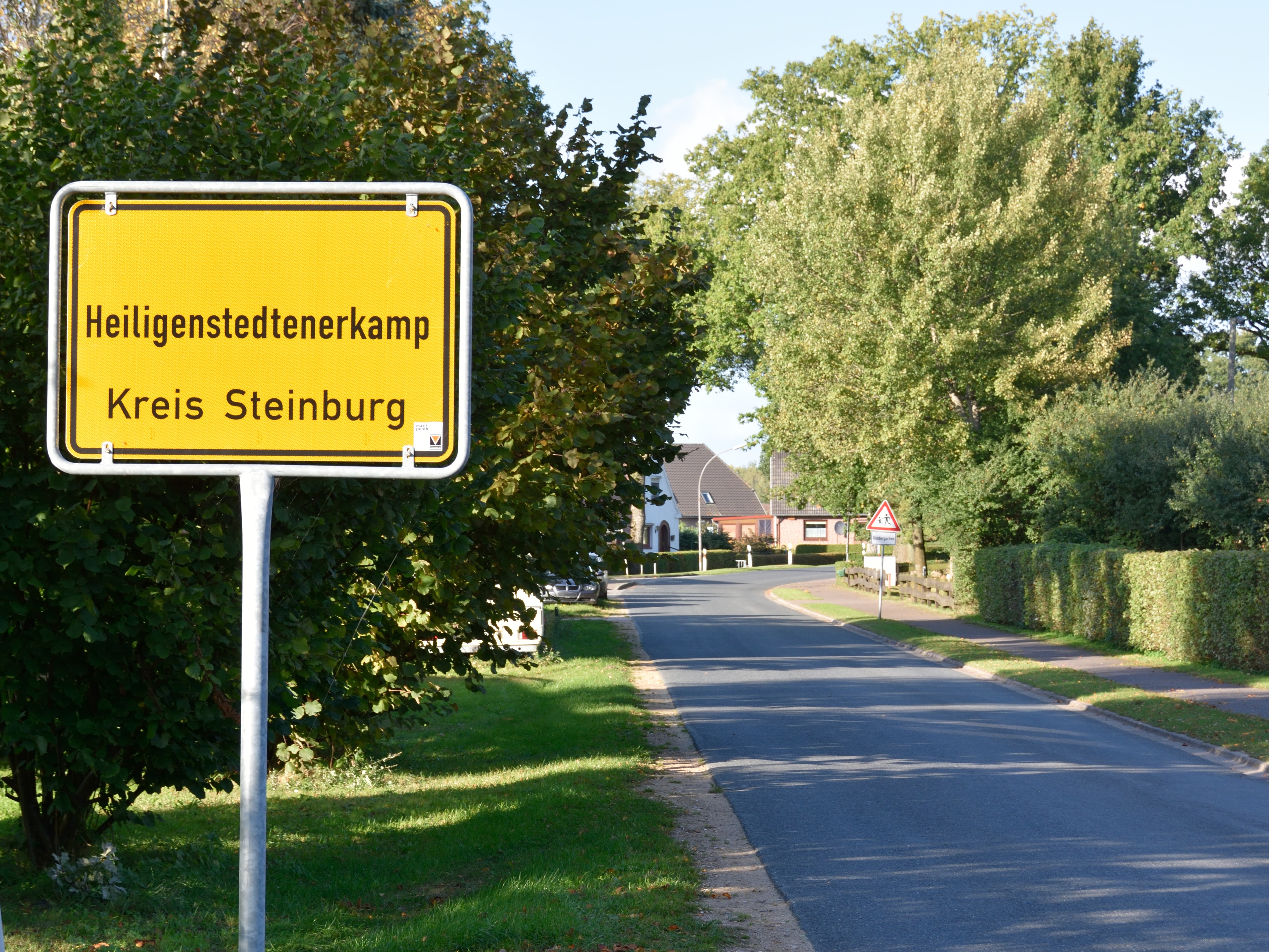 Schleswig-Holstein, Heiligenstedtenerkamp, die Ortstafel mit dem längsten Namen in Deutschland